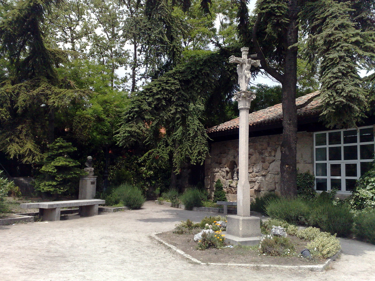 Torrelodones. Crucero de la Iglesia de la Asunción de Nuestra Señora, eb calle Camino de Valladolid.